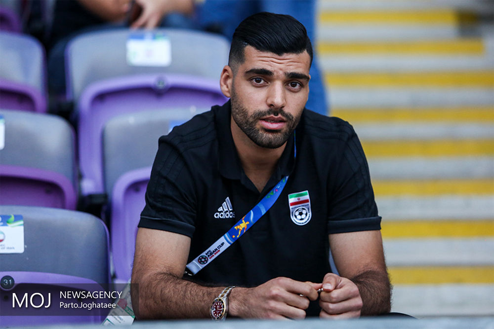 دیدار تیم‌های ملی فوتبال ایران و ژاپن دیدار تیم های ملی فوتبال ایران و ژاپن در مرحله نیمه نهایی هفدهمین دوره جام ملت های آسیا ۲۰۱۹ امارات ، با برتری ۳ بر صفر ژاپن در ورزشگاه بن زاید شهر العین برگزار شد.